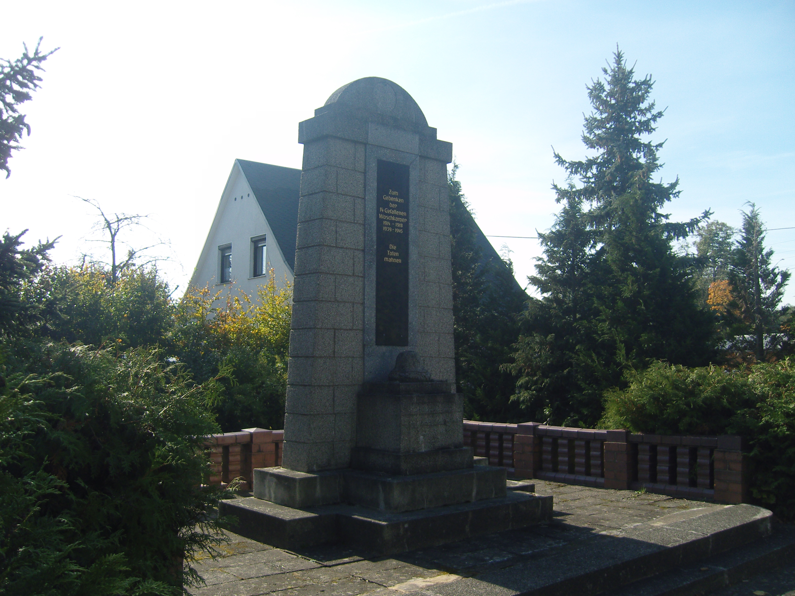 Kriegerdenkmal für die Gefallenen des Ersten und Zweiten Weltkrieges in Woschkow, Ortsteil in Großräschen